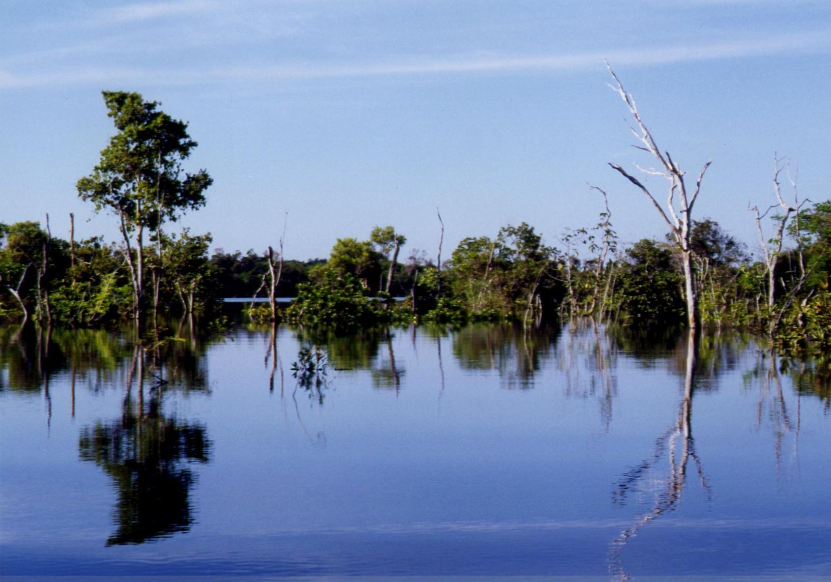 Igapó (foresta inondata), Amazonas, Brasile